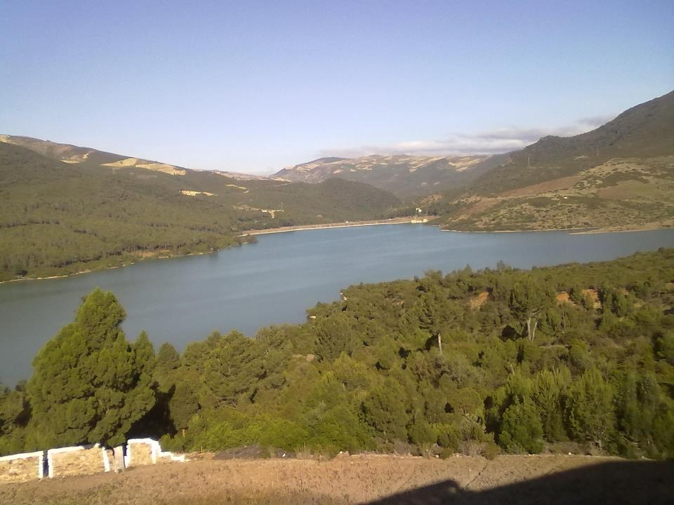 السد يتخد شكلا طوليا